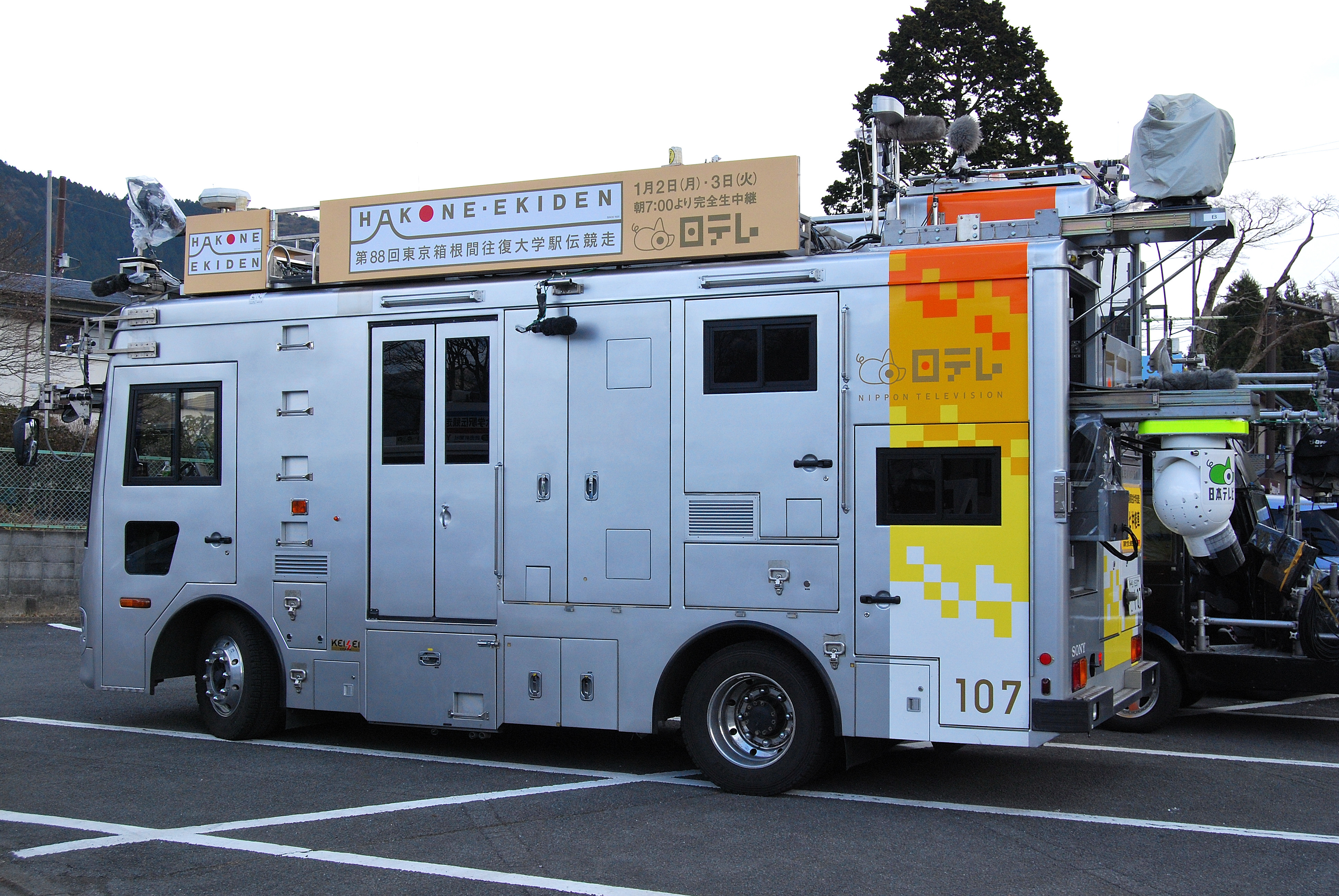 東京箱根間往復大学駅伝（箱根駅伝）で使用された日本テレビ中継車。